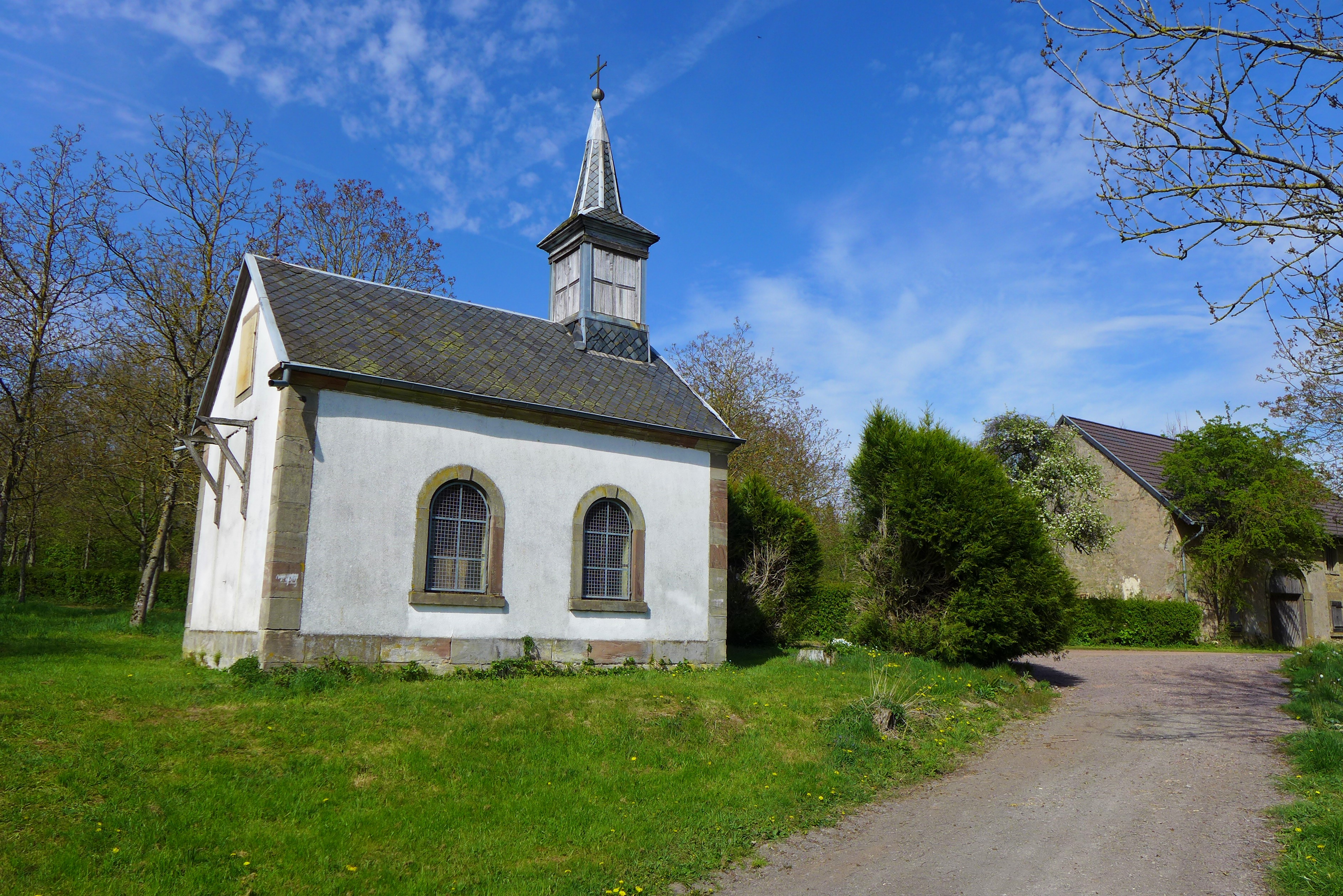 Wallerfangen, Limberg, Wallfahrtskapelle